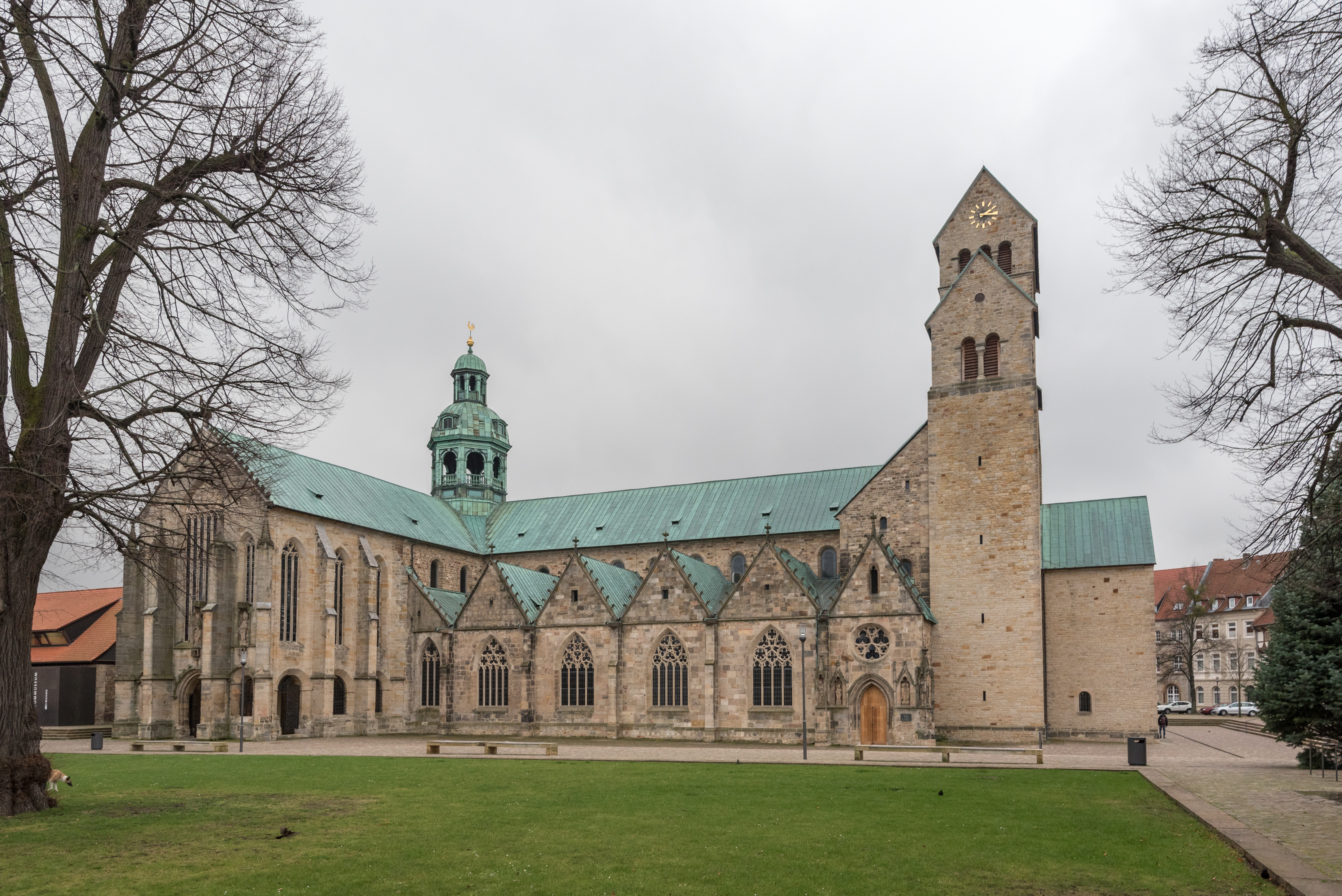 Hildesheimer Dom, Ansicht 2017 von Norden